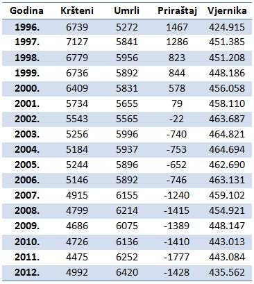 Kretanje katolika u BiH